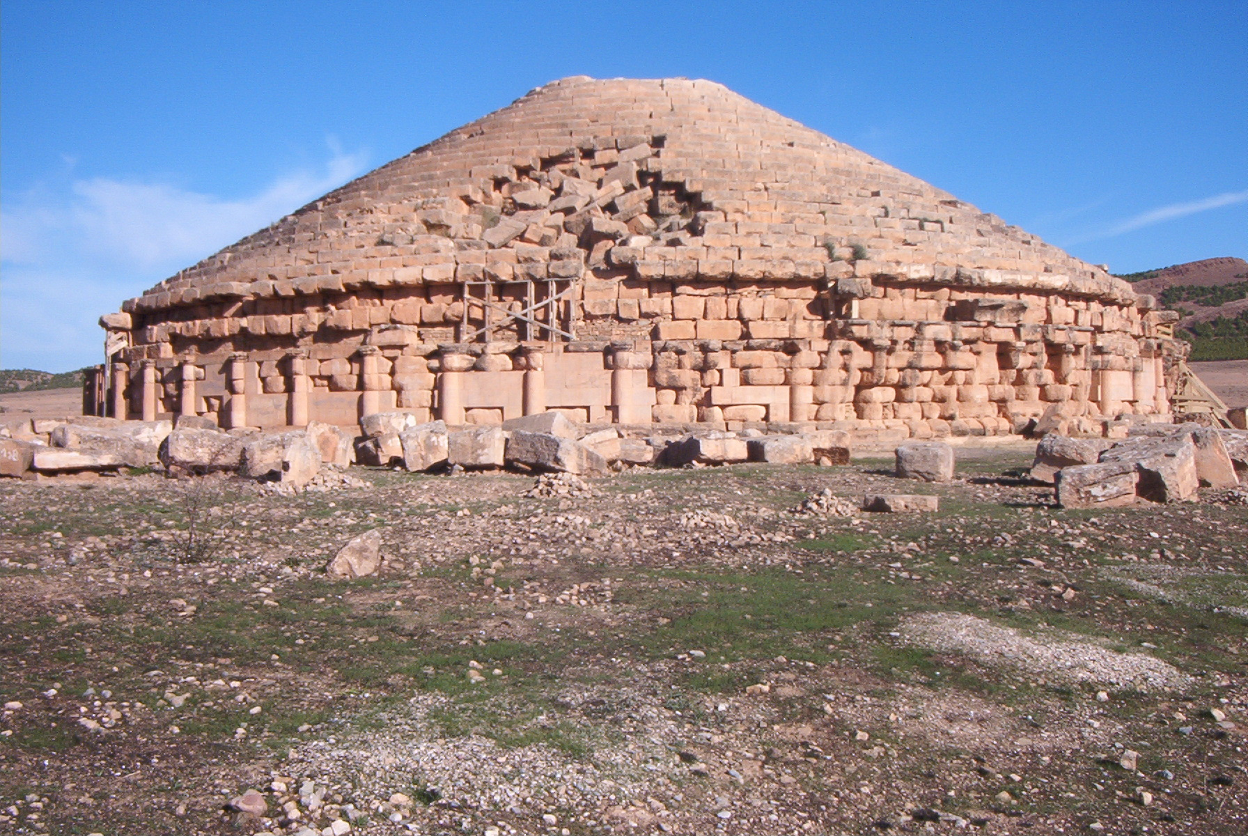 Le Medracen en novembre 2010. Boumia, Algérie.